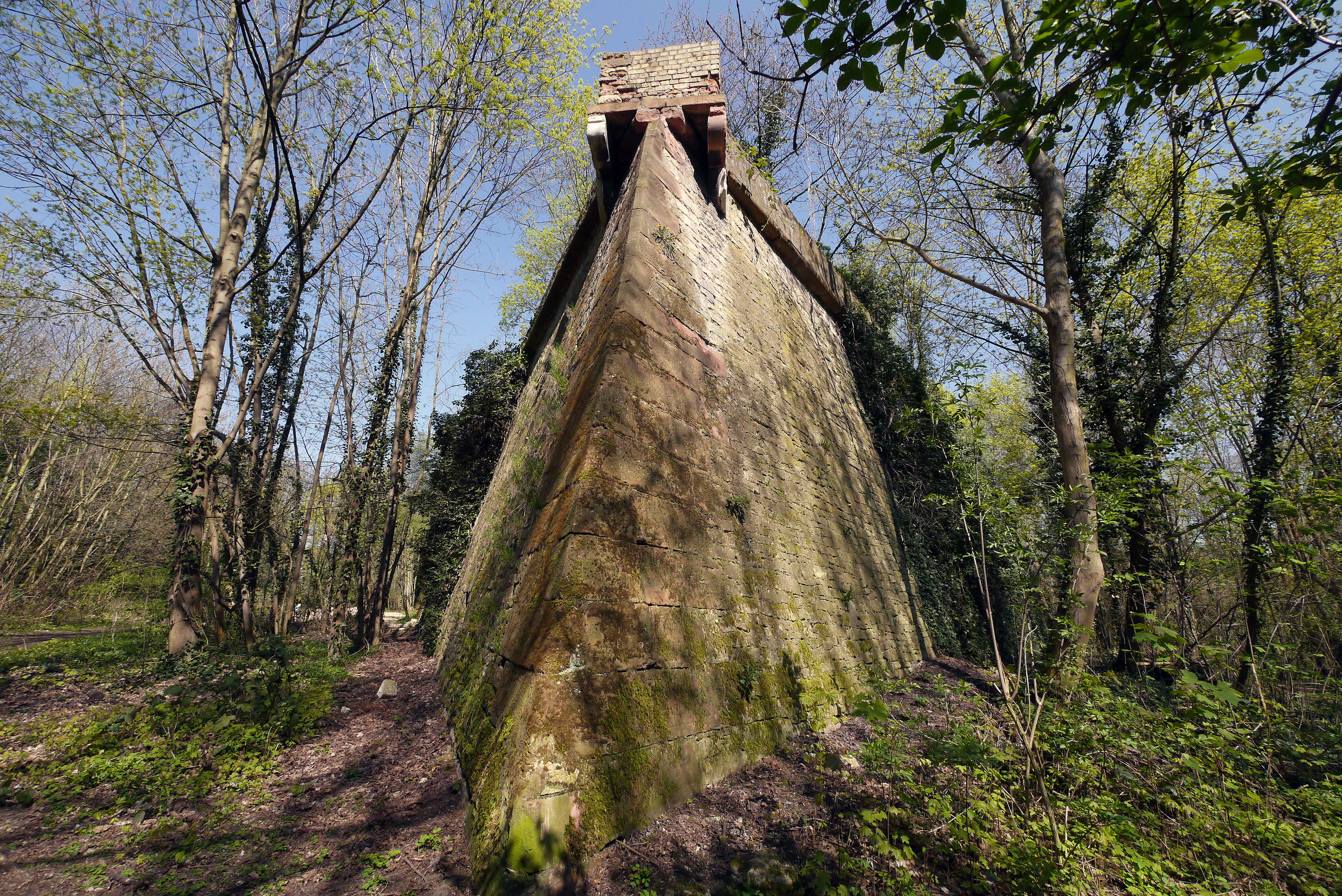 Zitadellengraben in Mainz, Frühling im geschützten Landschaftsbestandteil „Grünbestand der Zitadellenanlage mit Grabenbereich“, 2016